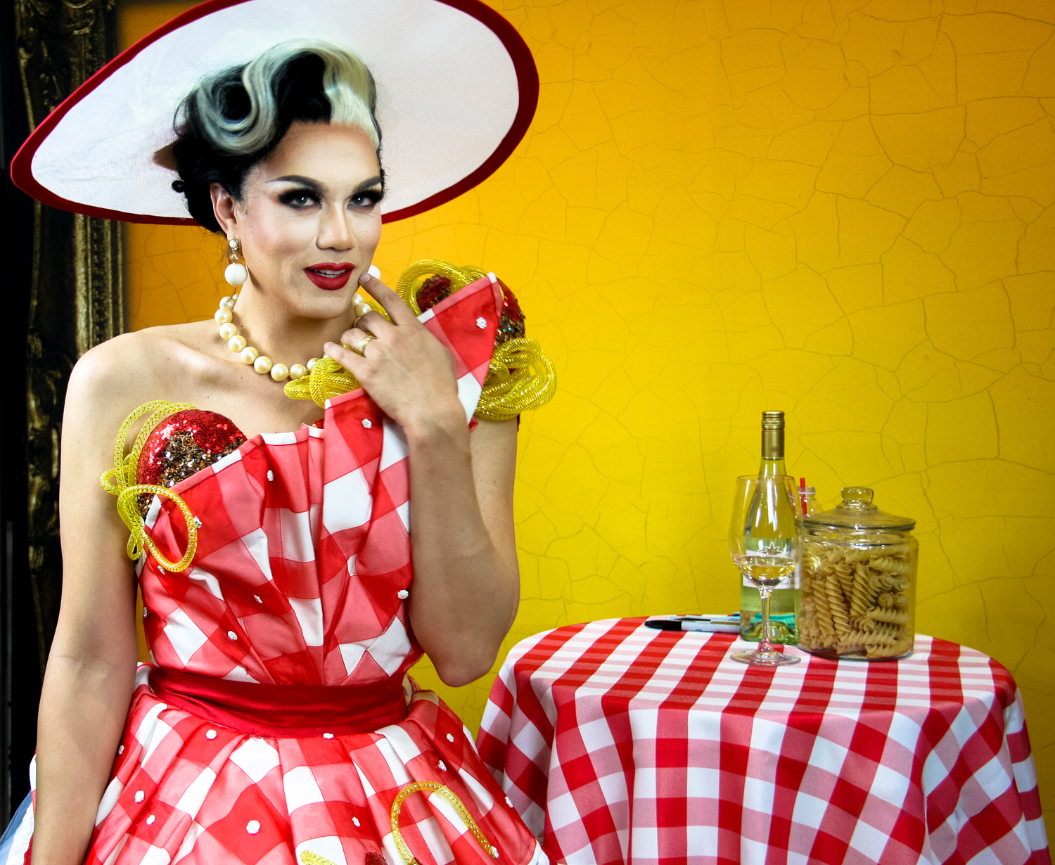 Rupaul DragCon 2019 - Los Angeles